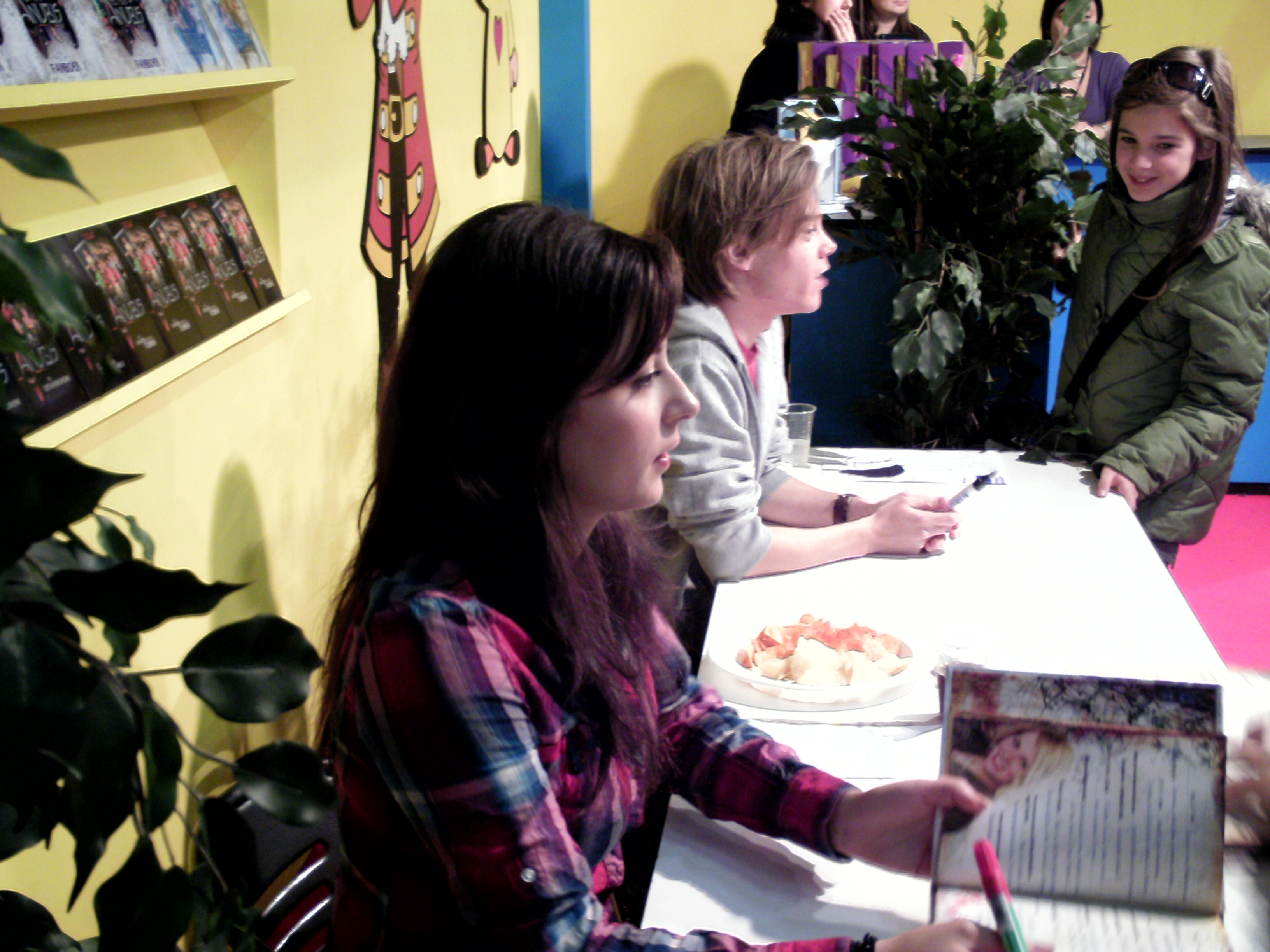 Noa (Gamze Tazim) en Robbie (Sander van Amsterdam) uit Het Huis Anubis signeren op de boekenbeurs van Antwerpen.